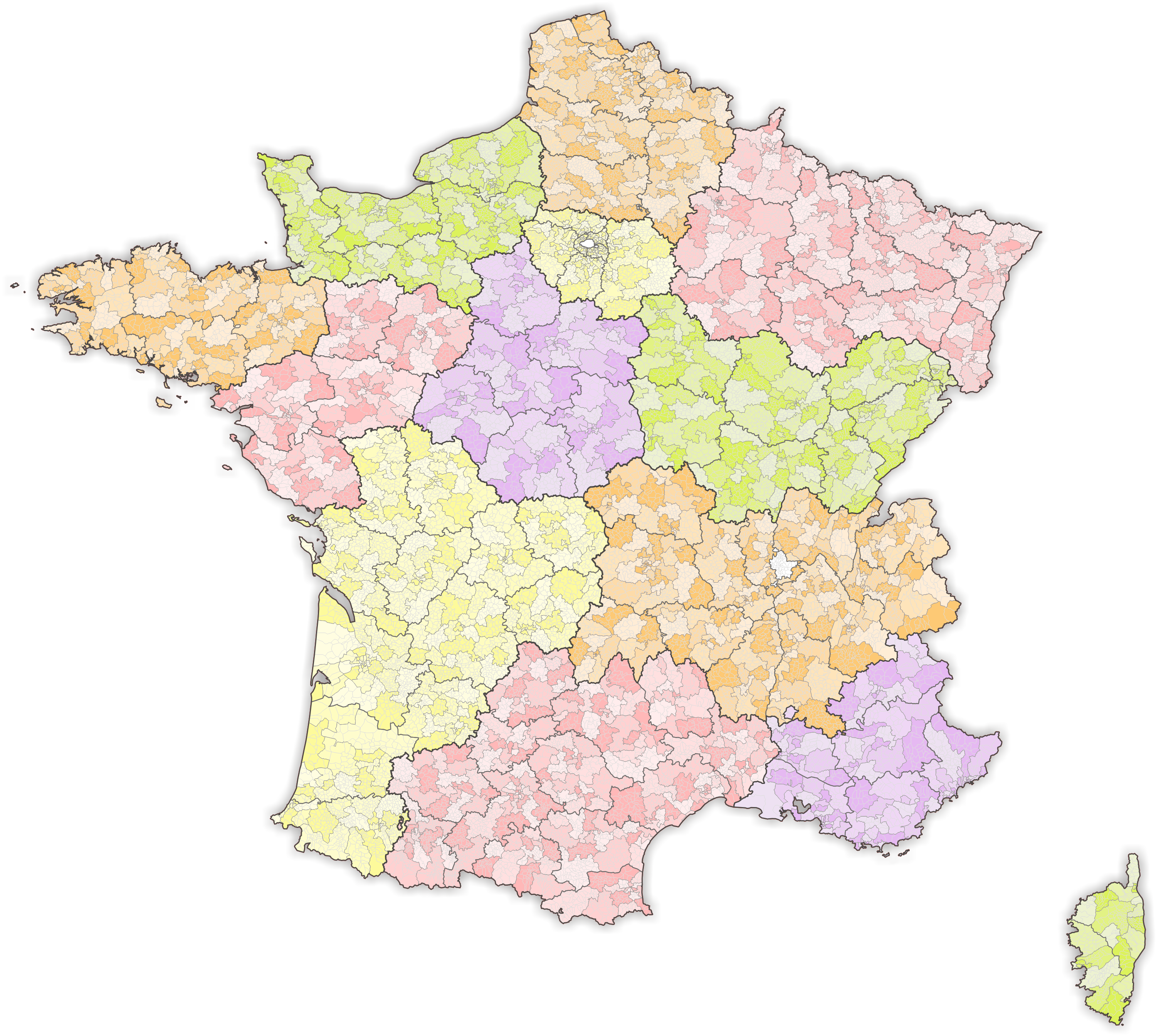 Kantone von Frankreich, Stand 2018